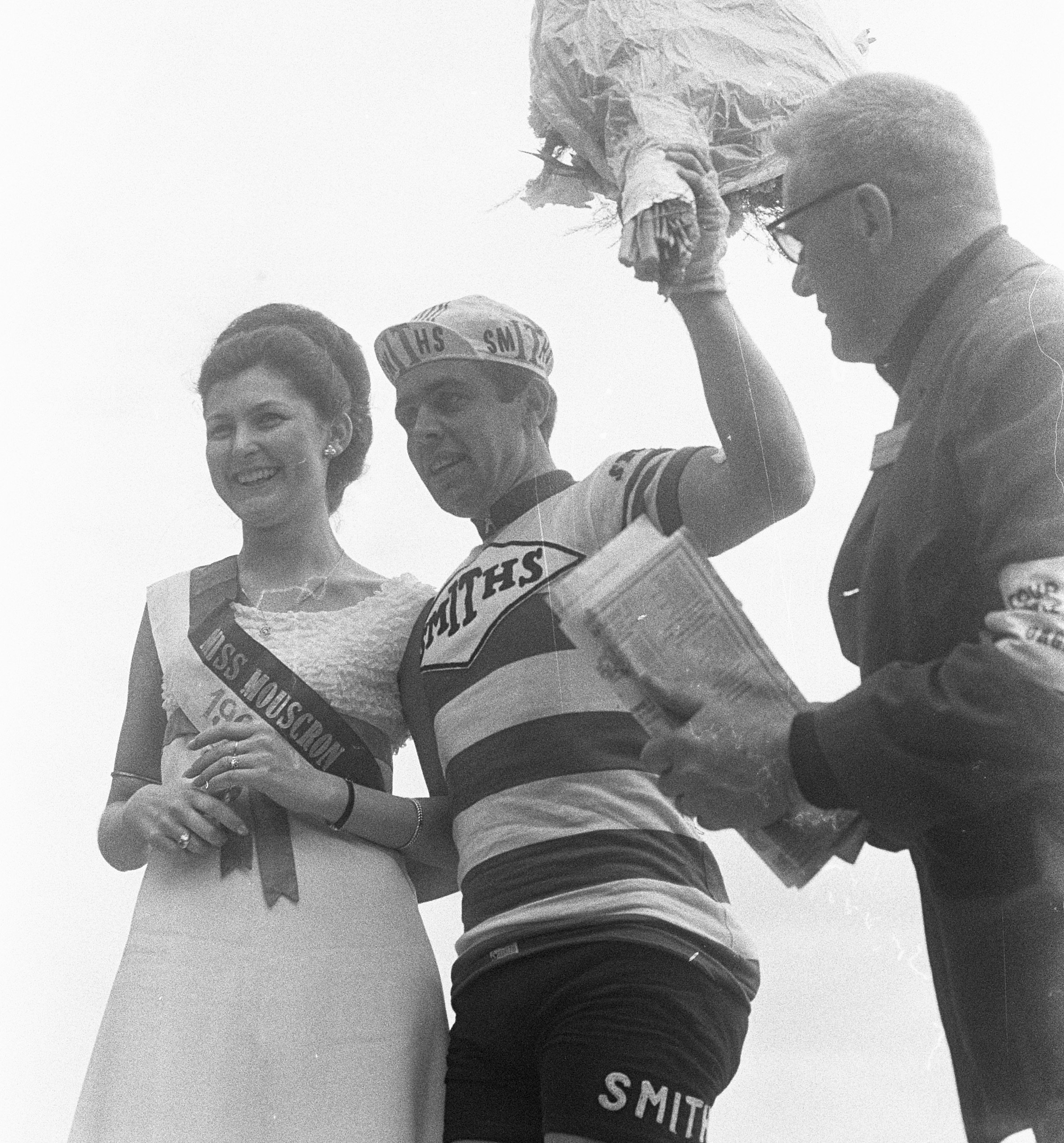 Tour de France, Guido Reybrouck op erepodium. 2e etappe, Charleville-Tournai. Miss Mouscron (Moekskroen) feliciteert.